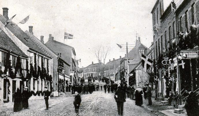 Ved broindvielsen i december 1904 var byen pyntet med granguilander og flag.